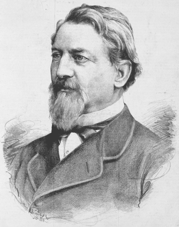 Bedřich Wachsmann (1820 - 1887), malíř a architekt. Portréty osobností od Jana Vilímka